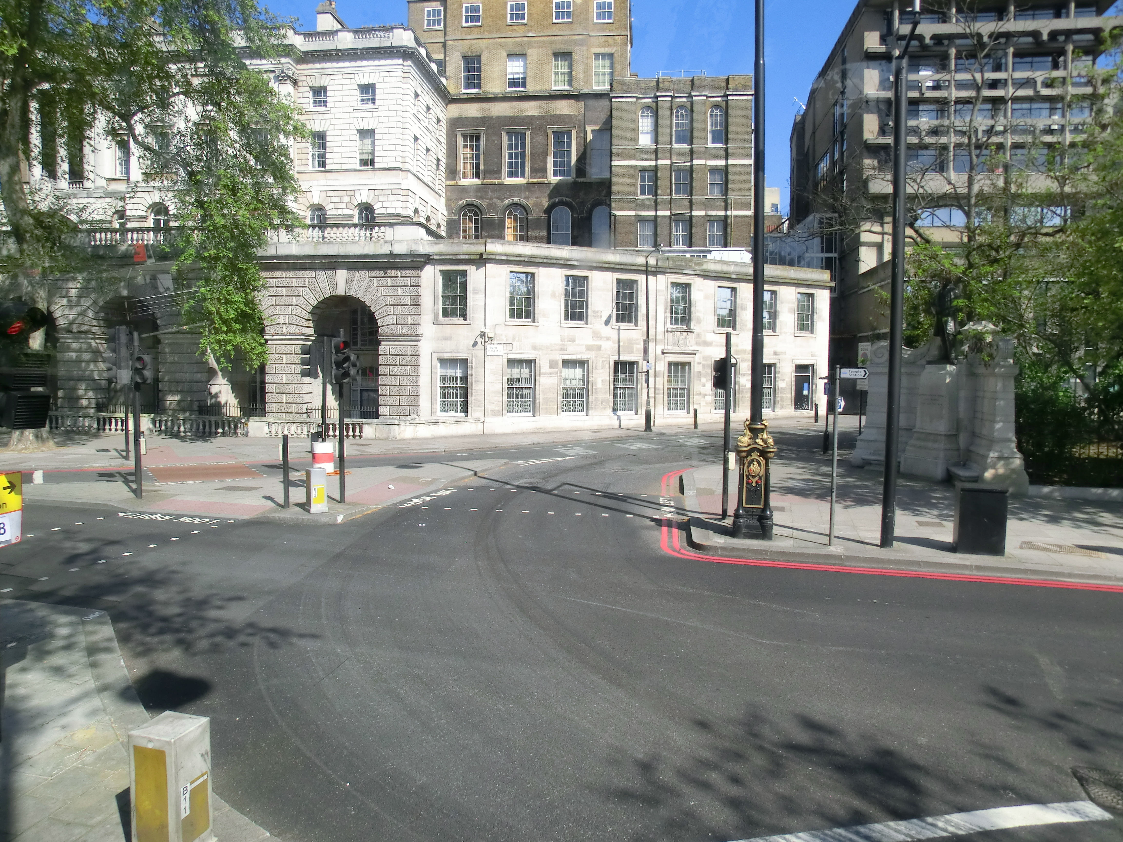 Temple Place London